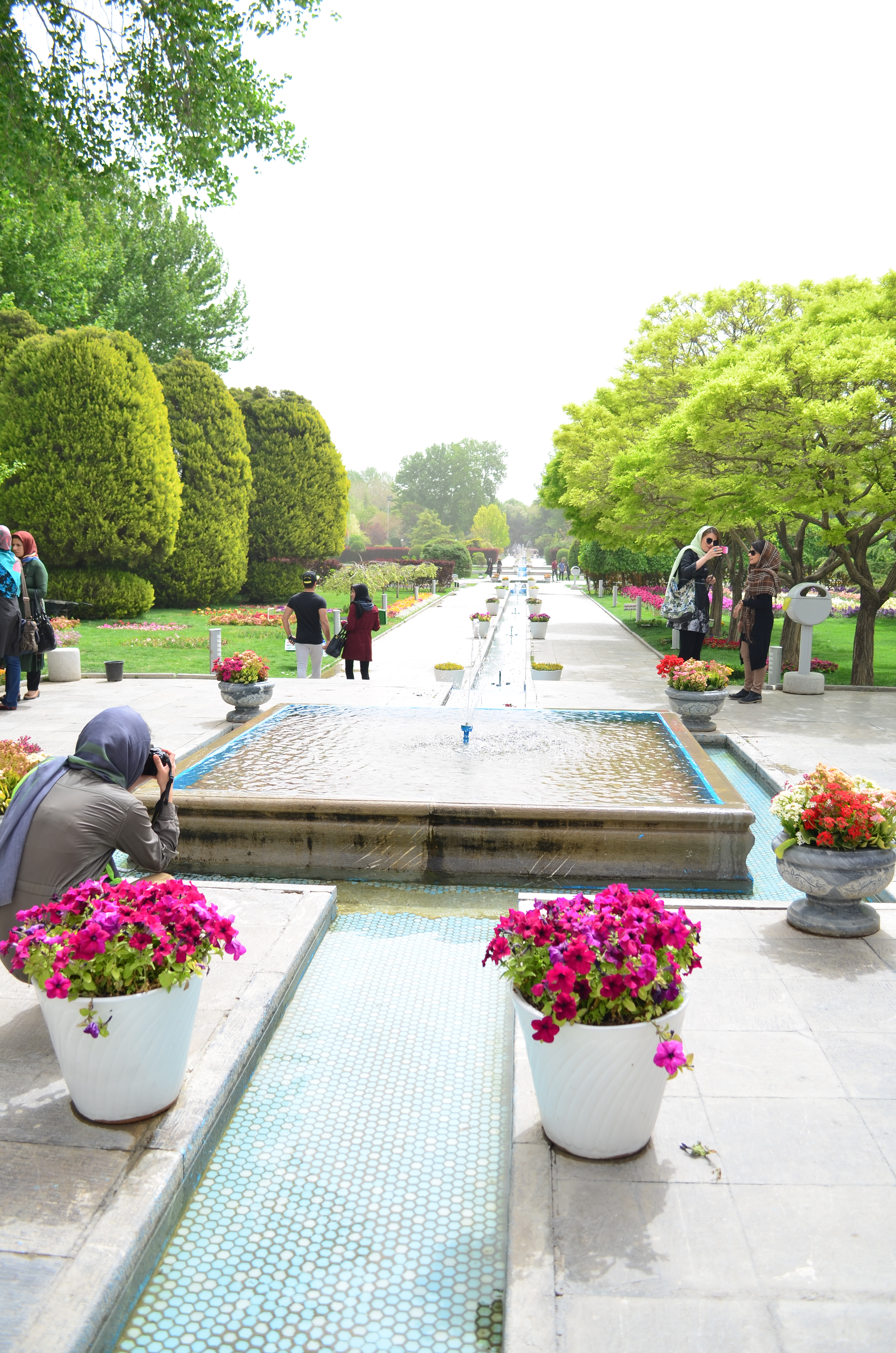 باغ گل ها، اصفهان، ایران